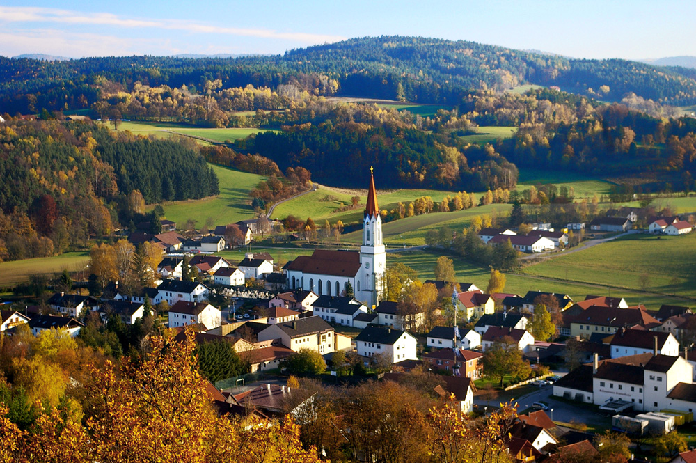 Zell im Bayerischen Wald, gesehen vom Lobenstein